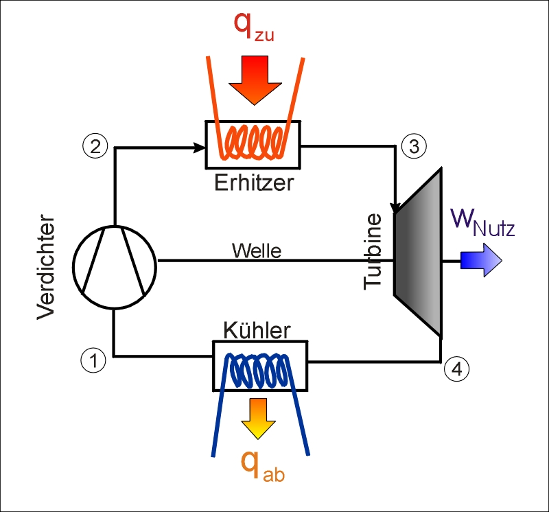 Darstellung des geschlossenen Joule-Prozess in mechanischer Anordnung. Selbst erstellt von Seldon11 am 21.09.06 mit Coreldraw auf Grundlage eines Tafelmitschriebes einer Thermoydnyamikvorlesung!